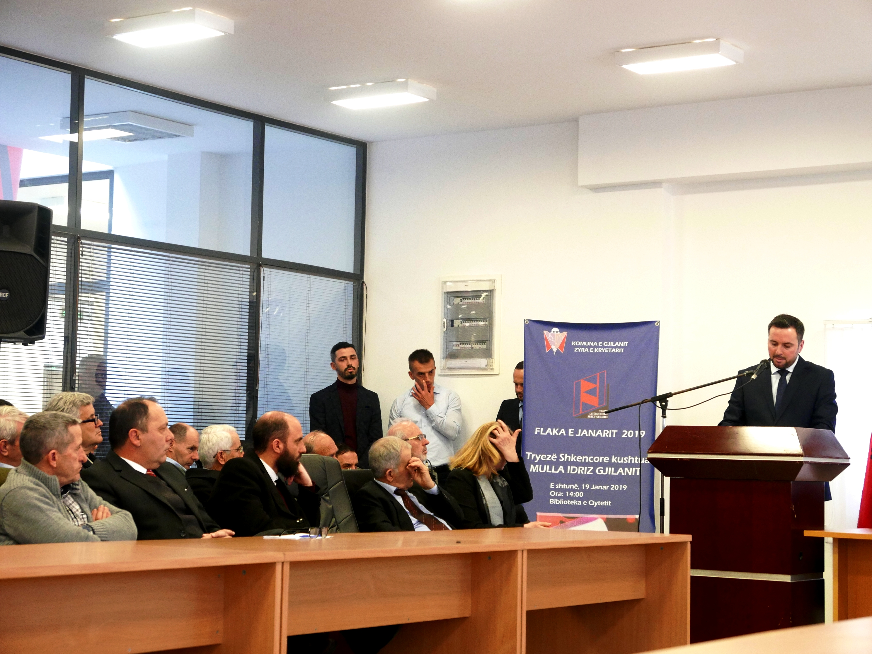 Tryeza shkencore kushtuar Mulla Idriz Gjilanit